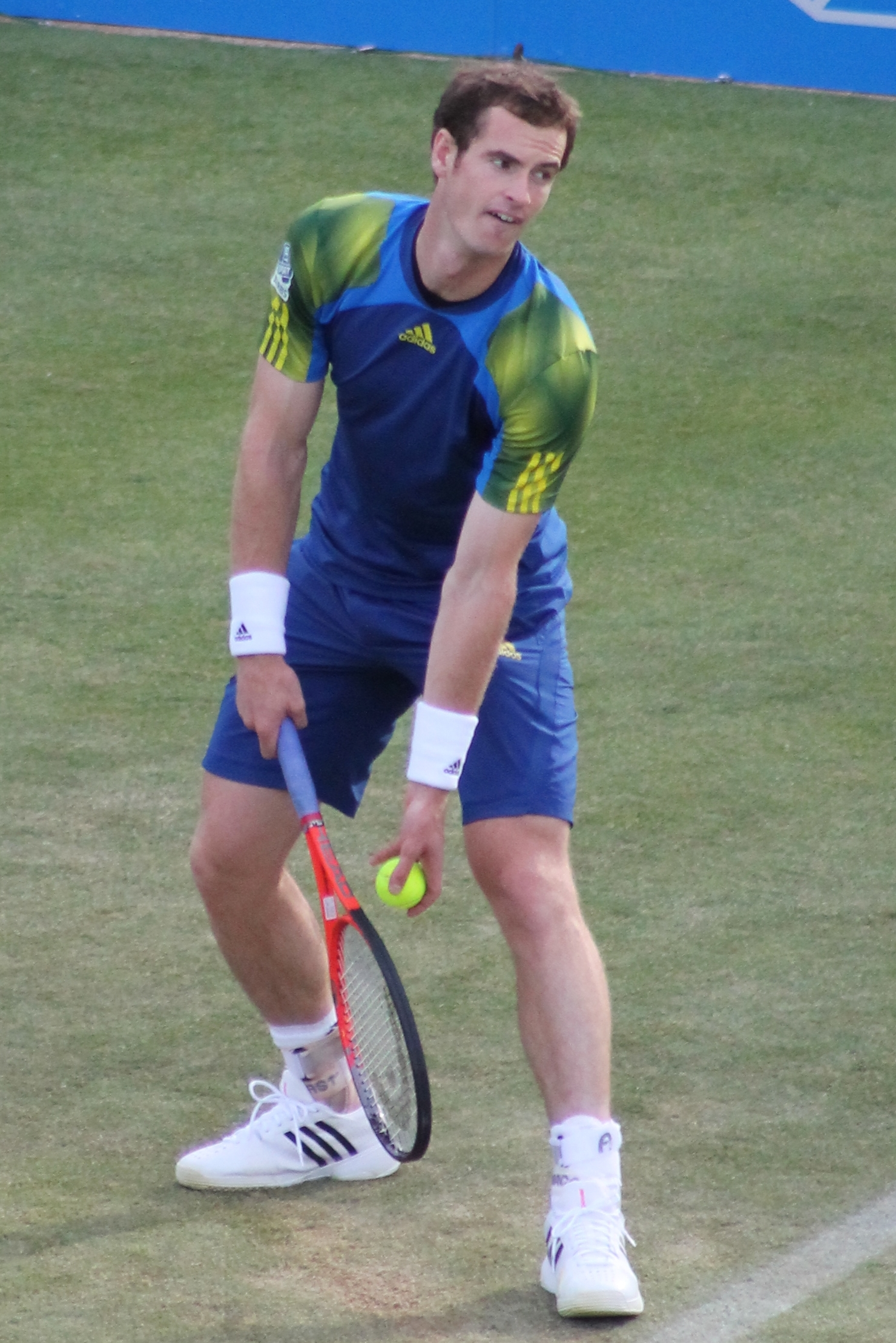 Murray A. QC13-016